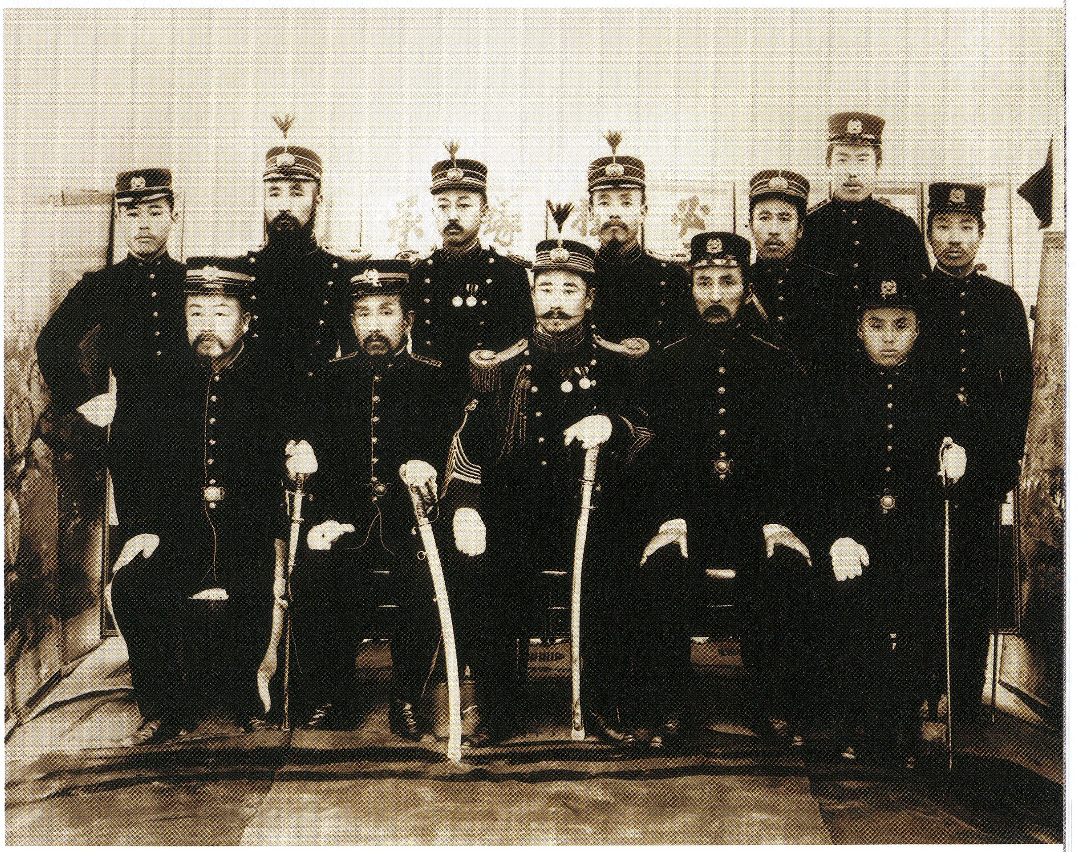 鎮衛隊水原歩兵大隊江華分遣隊の将兵。李東輝（中央）その左は趙尙錫一等軍司、右はホン・オソプ正校。後列左2人目は朴齊彦参尉、4人目兪弘濬参尉、5人目は崔永舜参尉、6人目がキム・ジョンベ正校